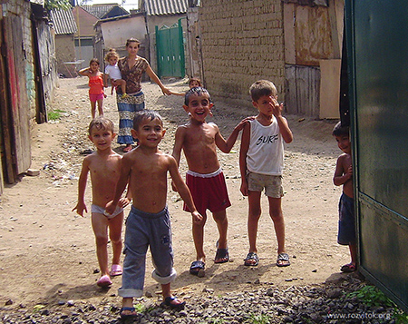 Мукачівський ромський табір